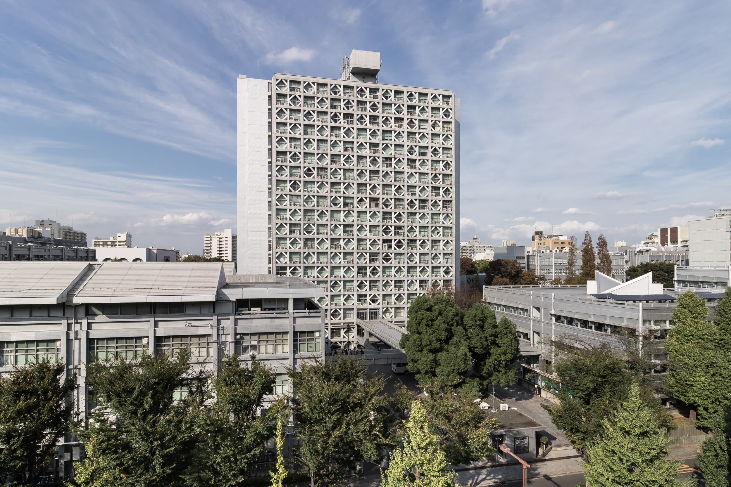 早稲田大学、西早稲田キャンパス51号館。安東勝男設計（1967）。